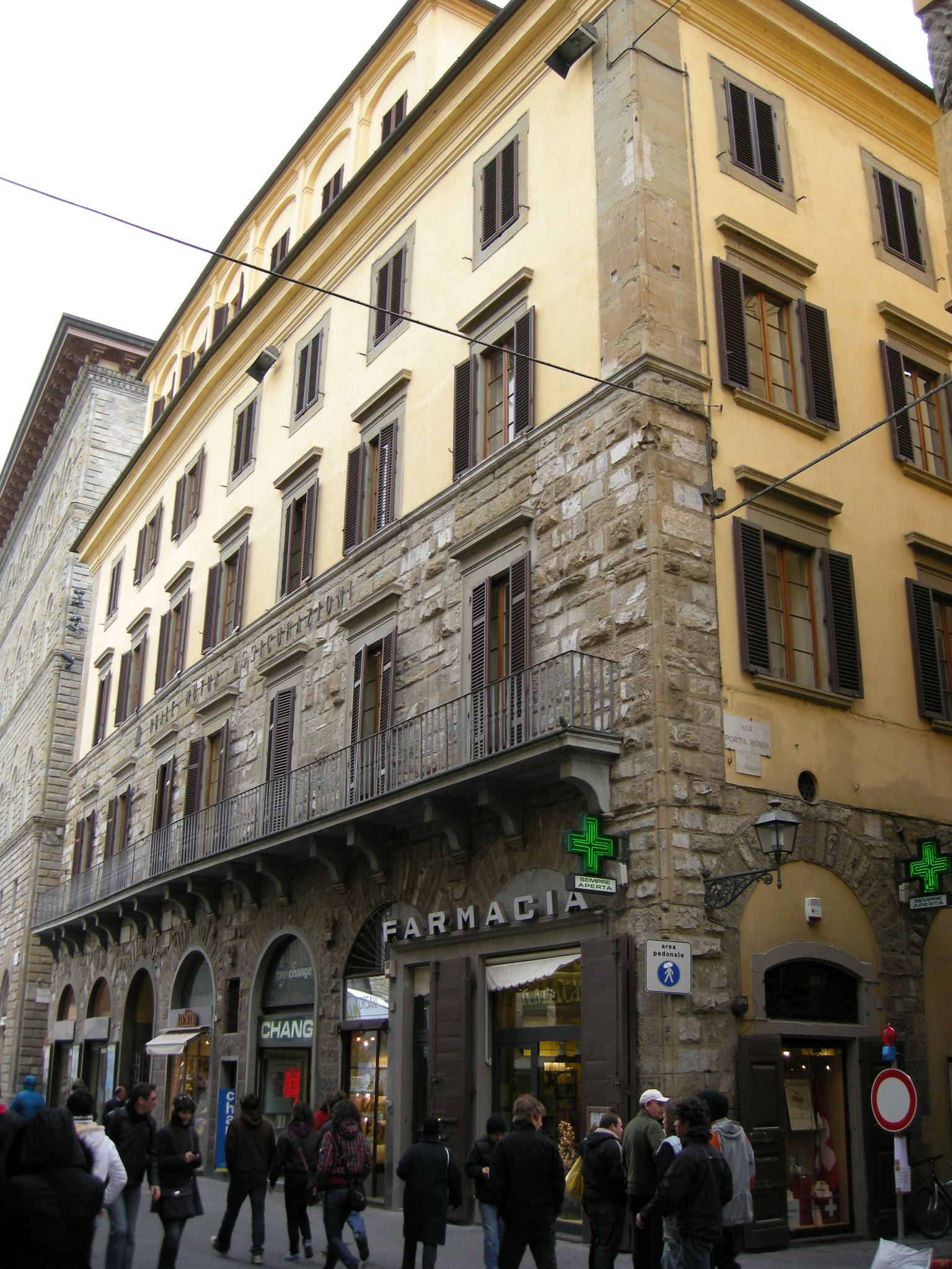 Via de' calzaiuoli, palazzo dell'arte dei mercatanti